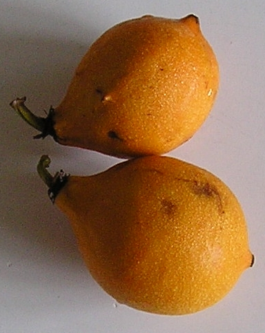 Fruta do Bacupari (Garcinia gardneriana) - São Paulo - Brasil